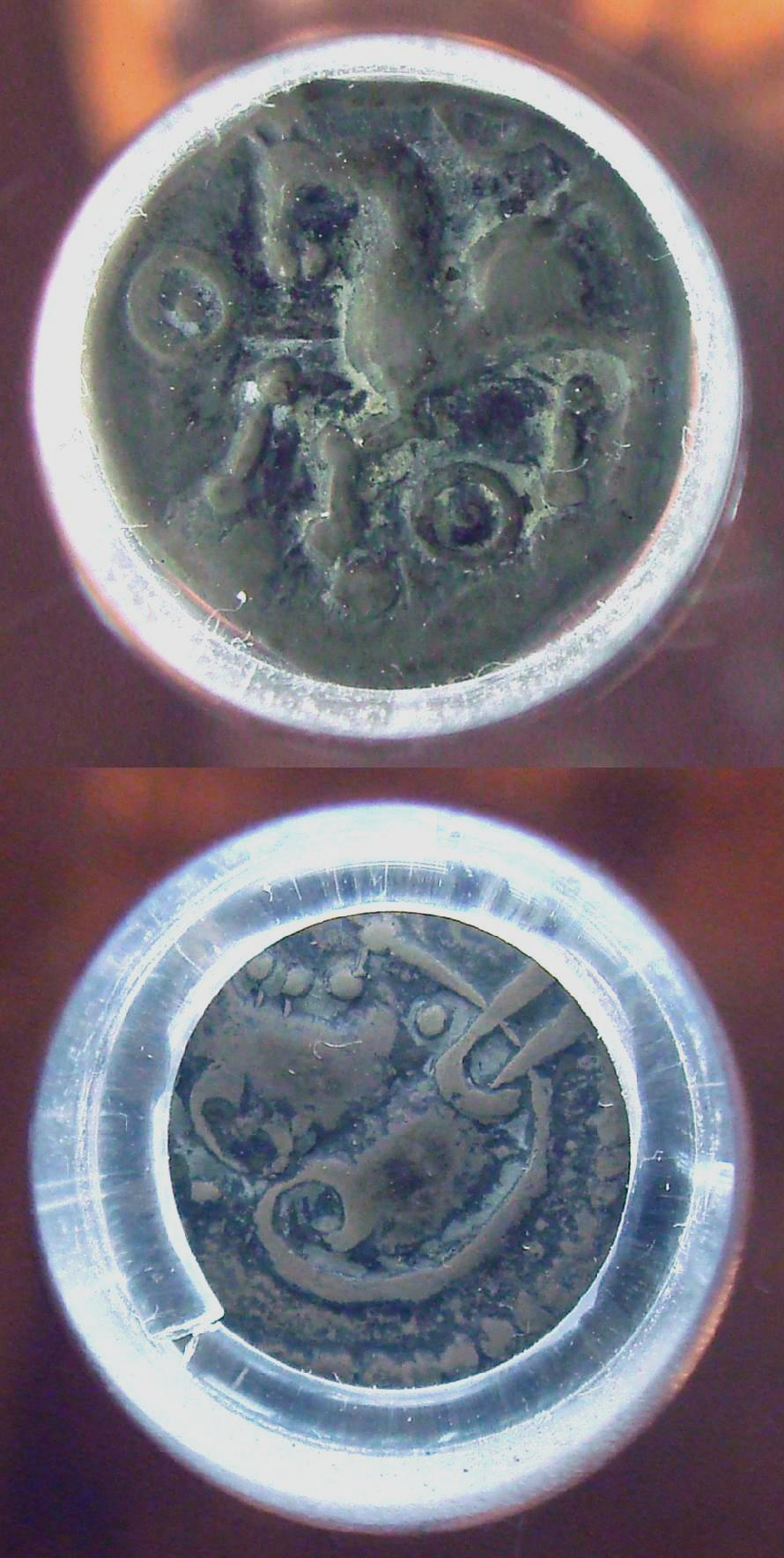 Eduens_denier_1st_century_BCE_1940mg